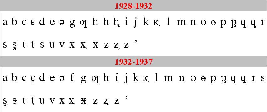 lak alphabet (1928-1938)